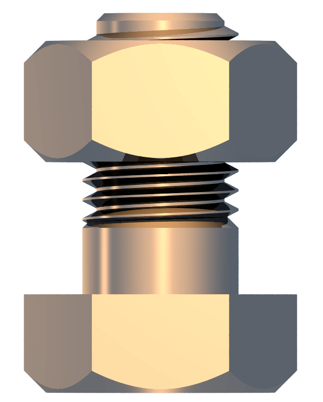 Skruvförband